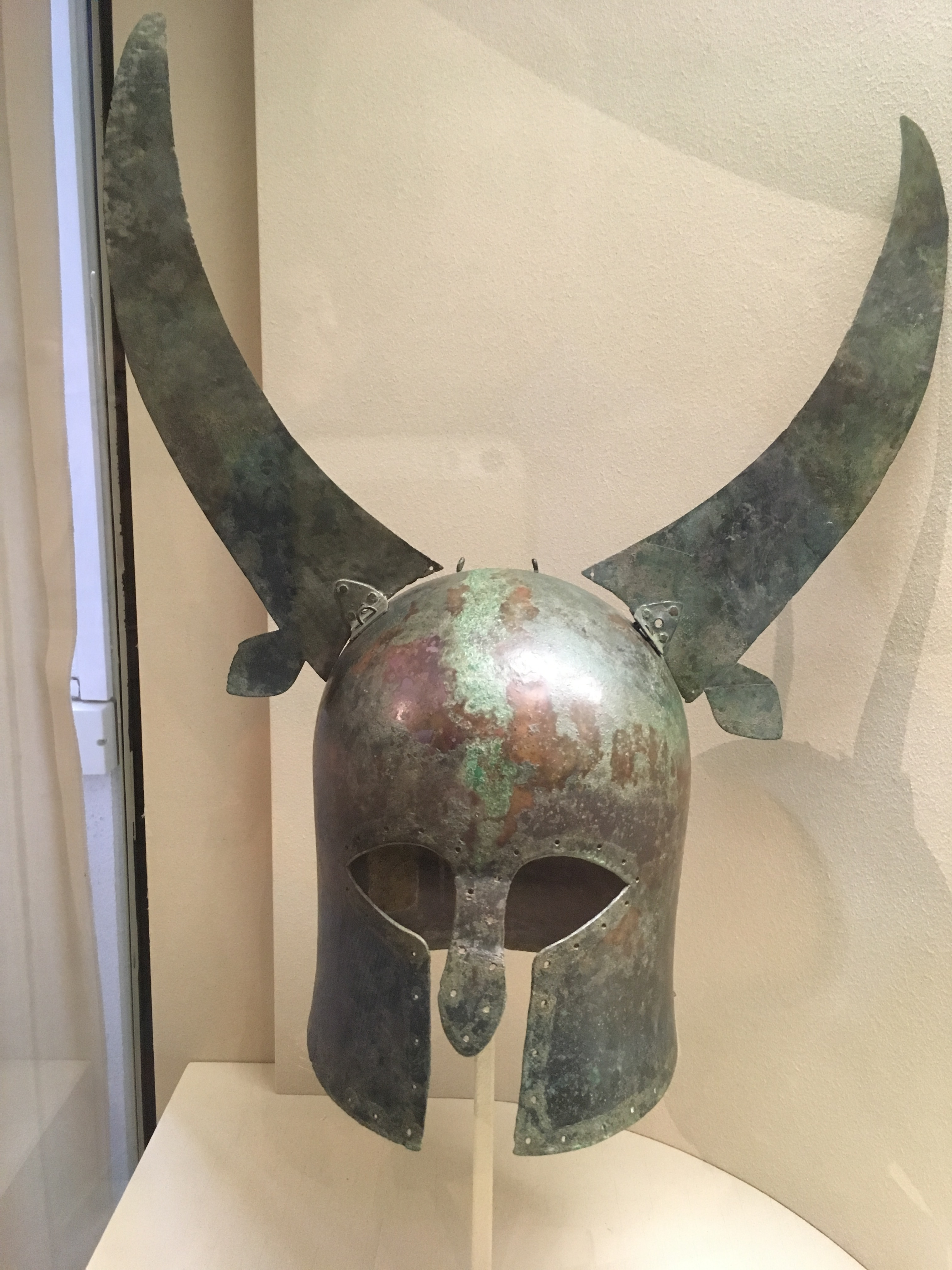 Апуло-коринфский шлем, примерно 650 г. до н.э. , Жененвский музей искусства и истории